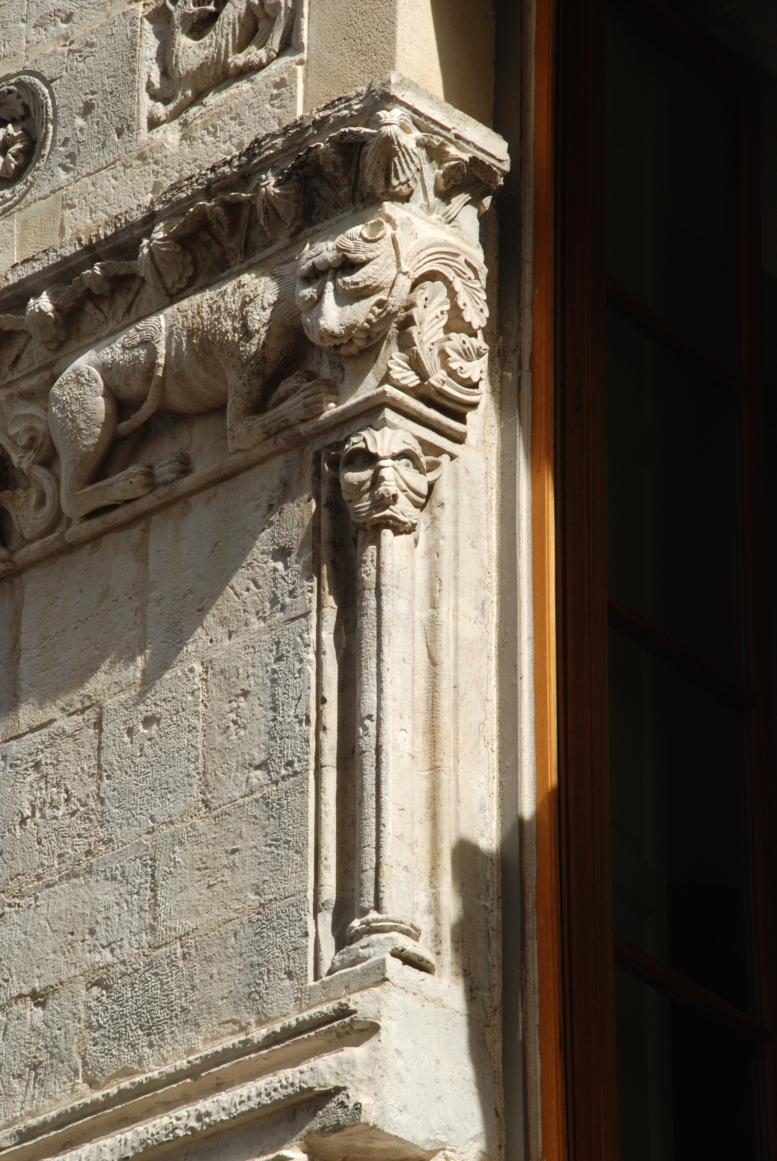 France - Provence - Maison romane de Nîmes